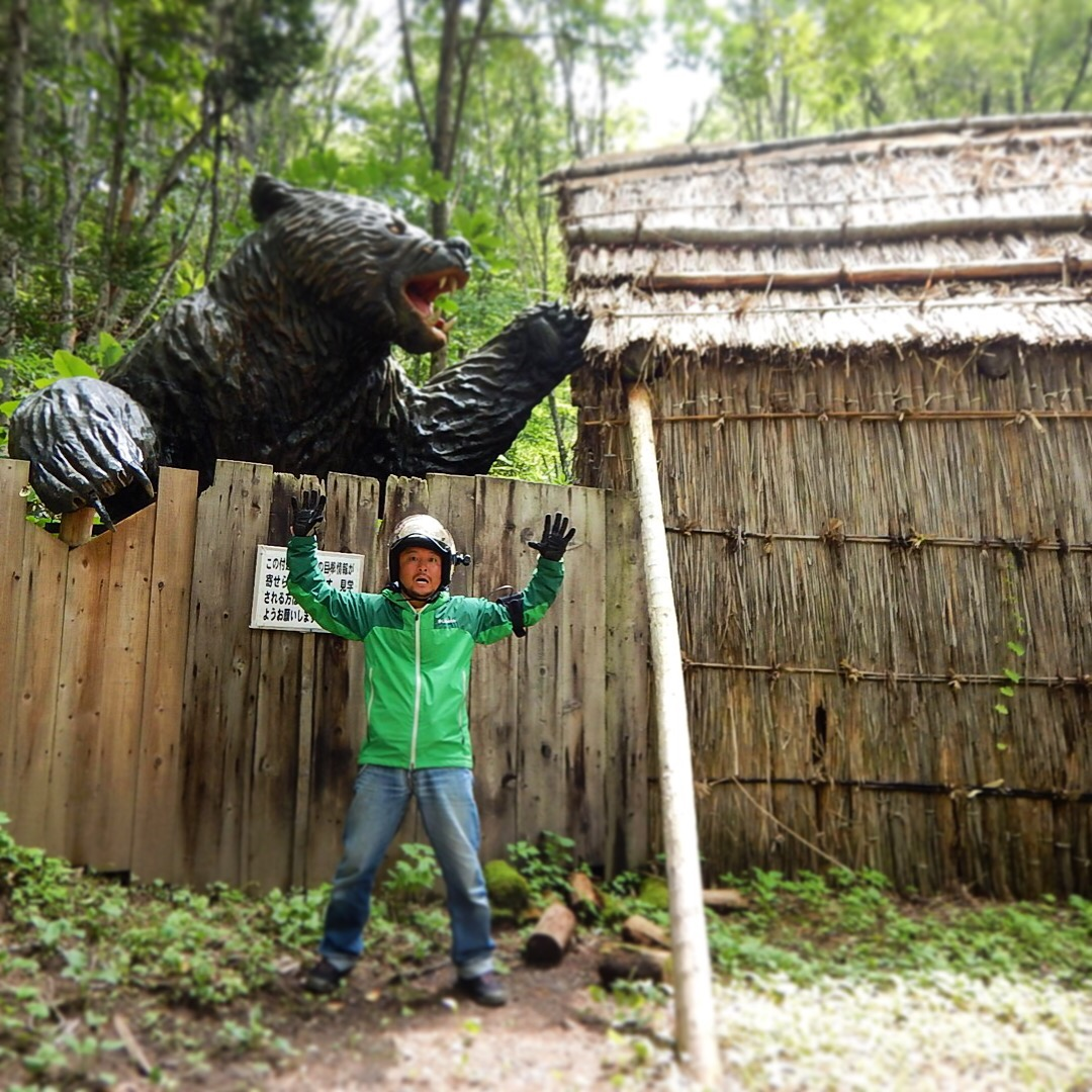 事件現場にて。道中に「ヒグマ注意！」の看板がたくさんあって怖かったので、撮影してすぐに逃げました！